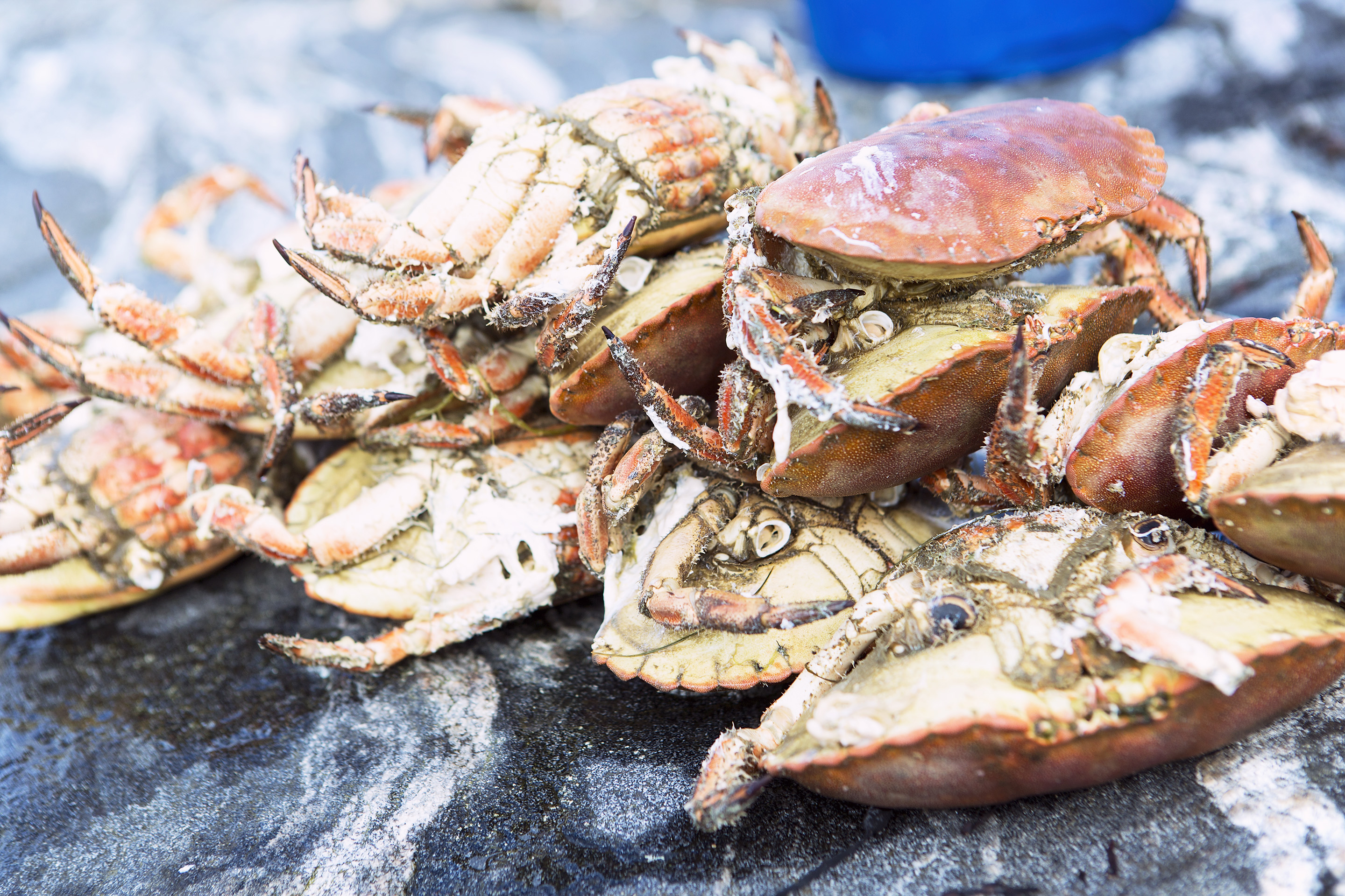 Krabbefangst på Bondøya i Vikna på Trøndelagskysten.